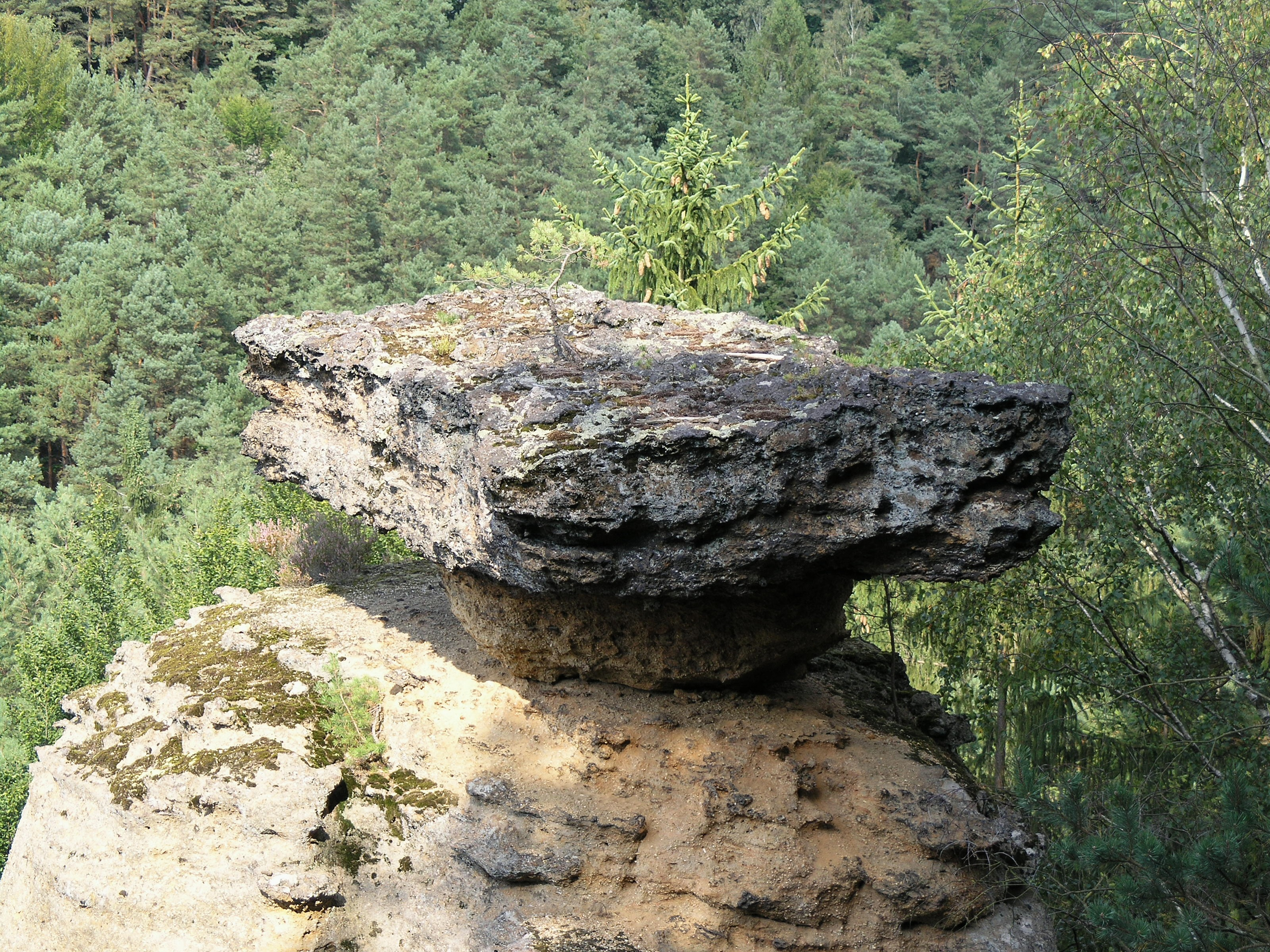 Jestřebické pokličky - poklička